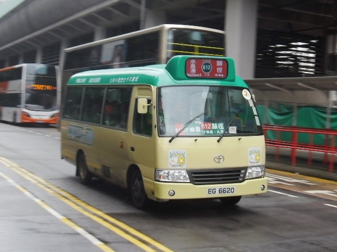 新界專線小巴812線，正準備前往水泉澳邨